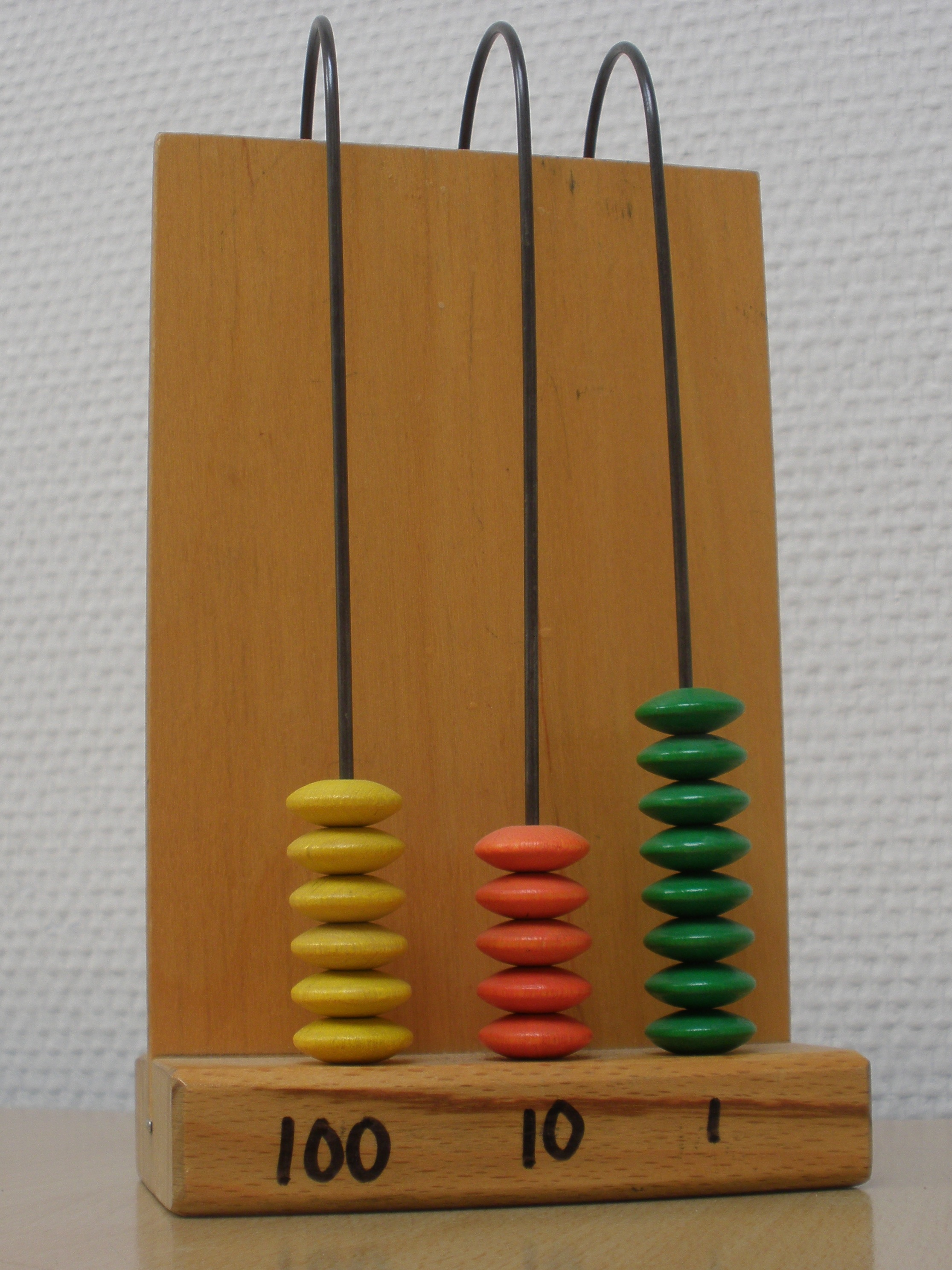 Een abacus zoals deze gebruikt wordt op sommige scholen als voorbereiding op het leren cijferen.